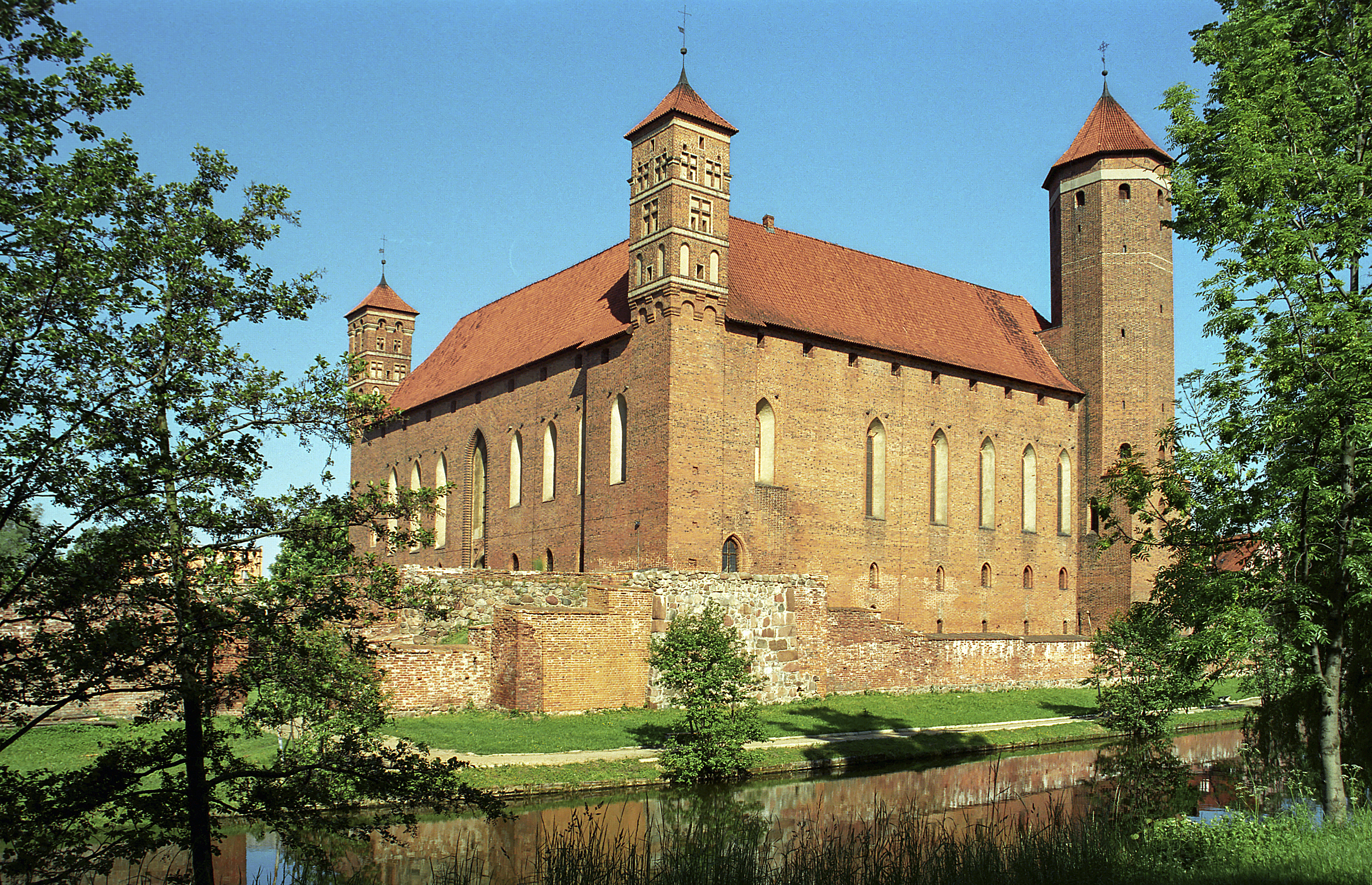 Poland, Lidzbark Castle